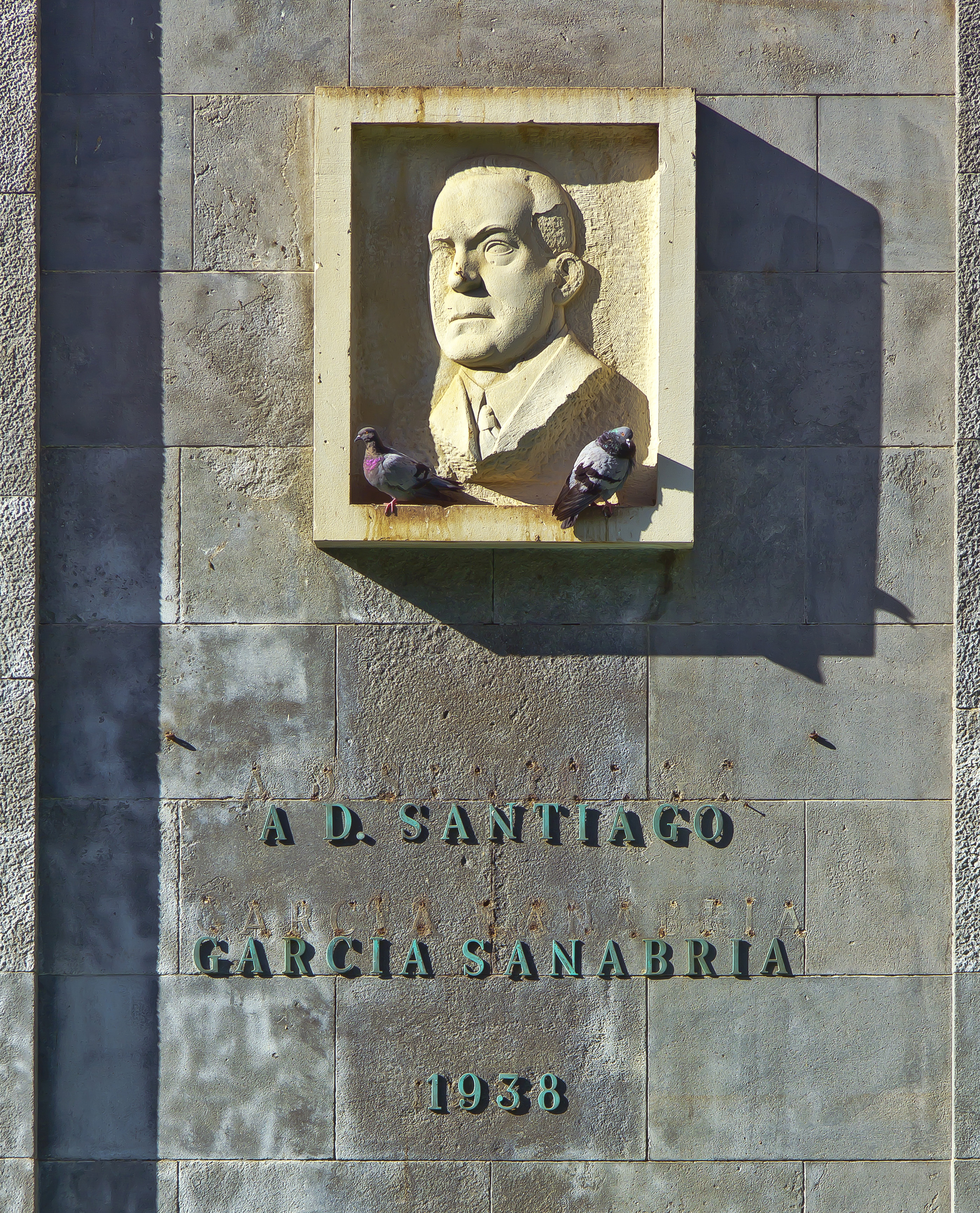 Das „Monumento a García Sanabria“, eine Gemeinschaftsarbeit des Architekten José Enrique Marrero Regalado und des Bildhauers Francisco Borges Salas, wurde 1938 zu Ehren des ehemaligen Bürgermeisters von Santa Cruz de Tenerife in dem gleichnamigen Park errichtet.